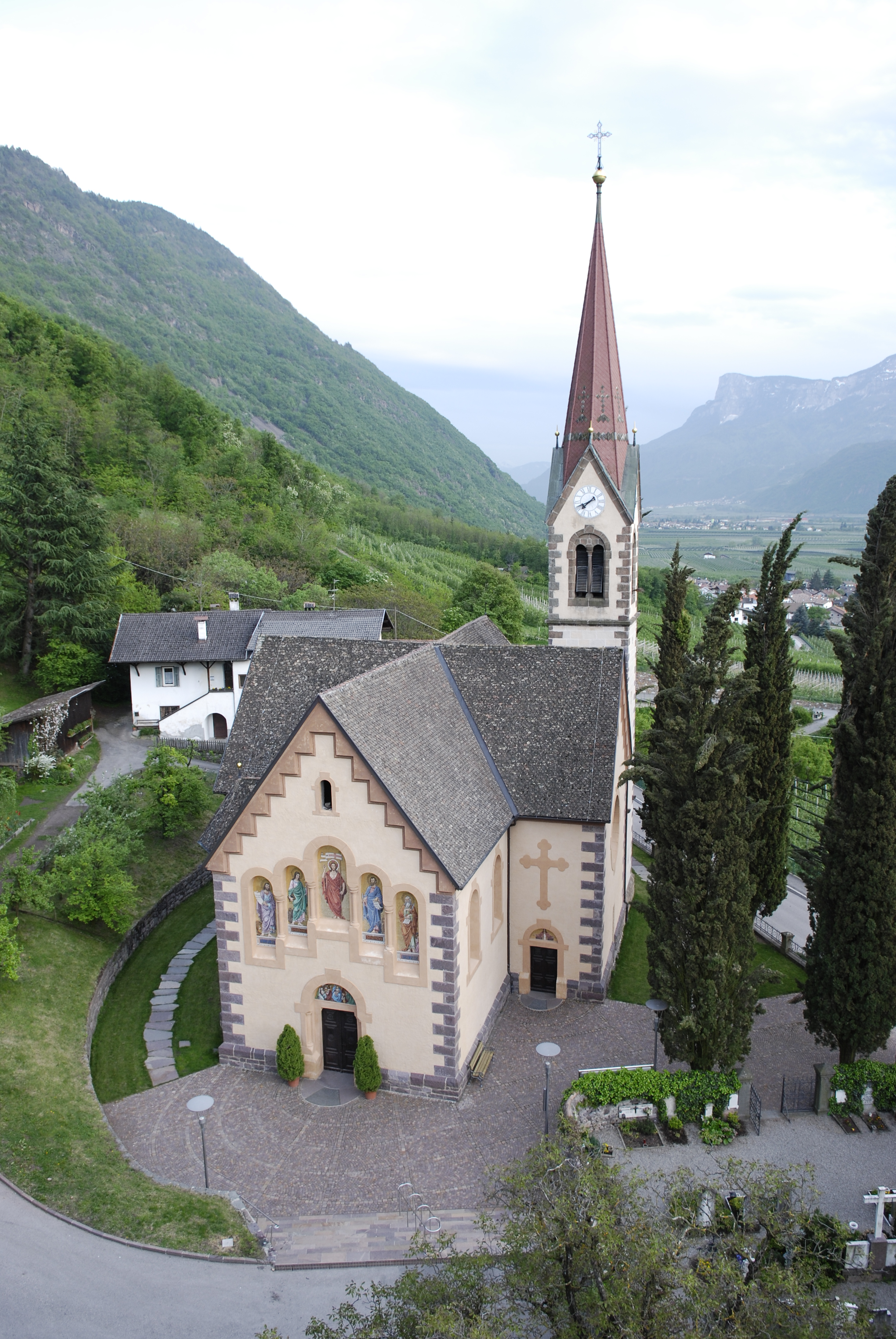 Pfarrkirche zum Hl. Kreuz in Burgstall (Italien)